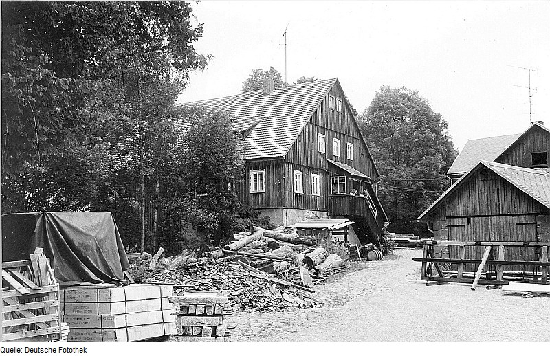 Original image description from the Deutsche Fotothek Oppach. Buschmühle (Sägewerk)